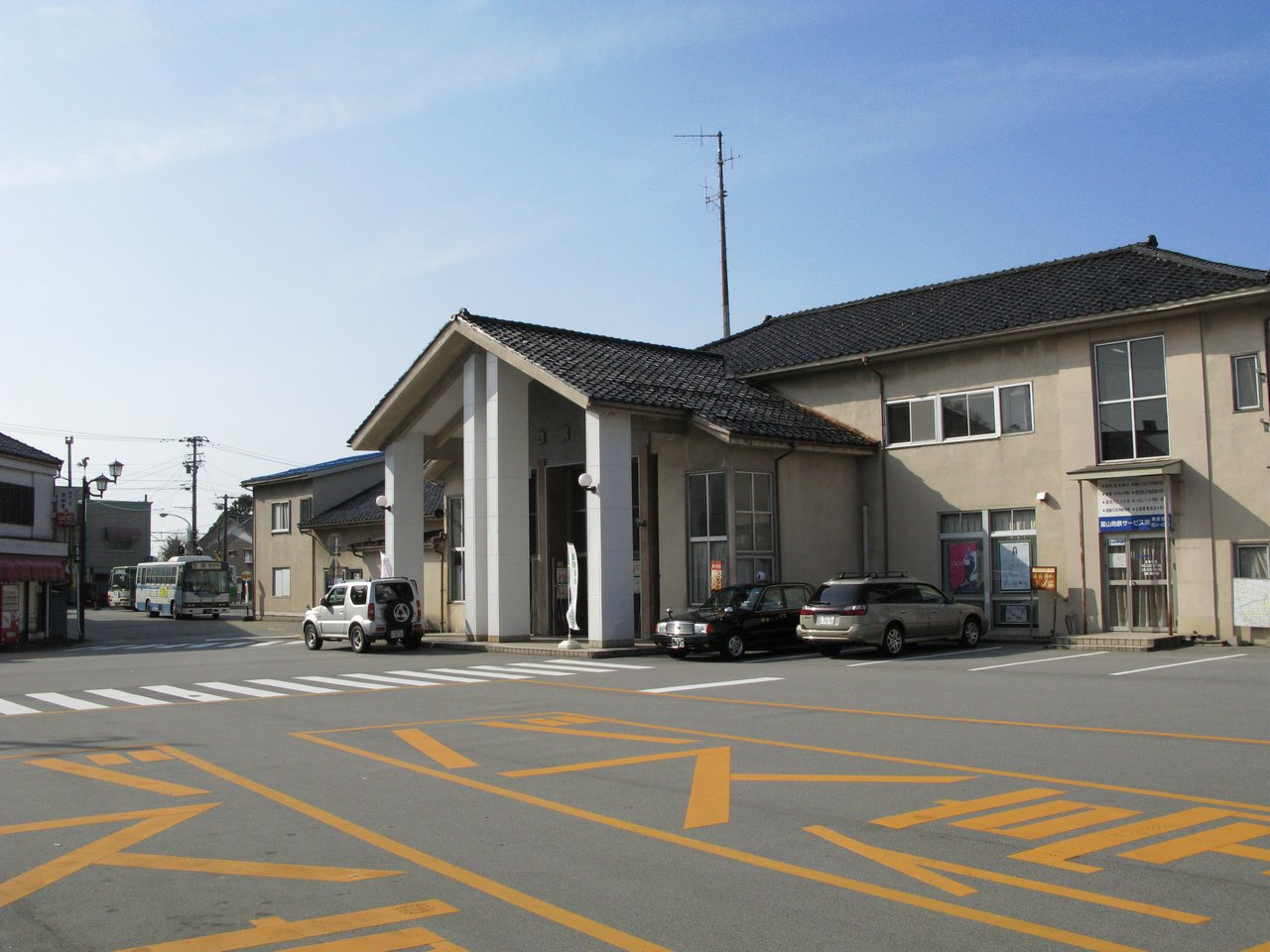 電鉄黒部駅駅舎